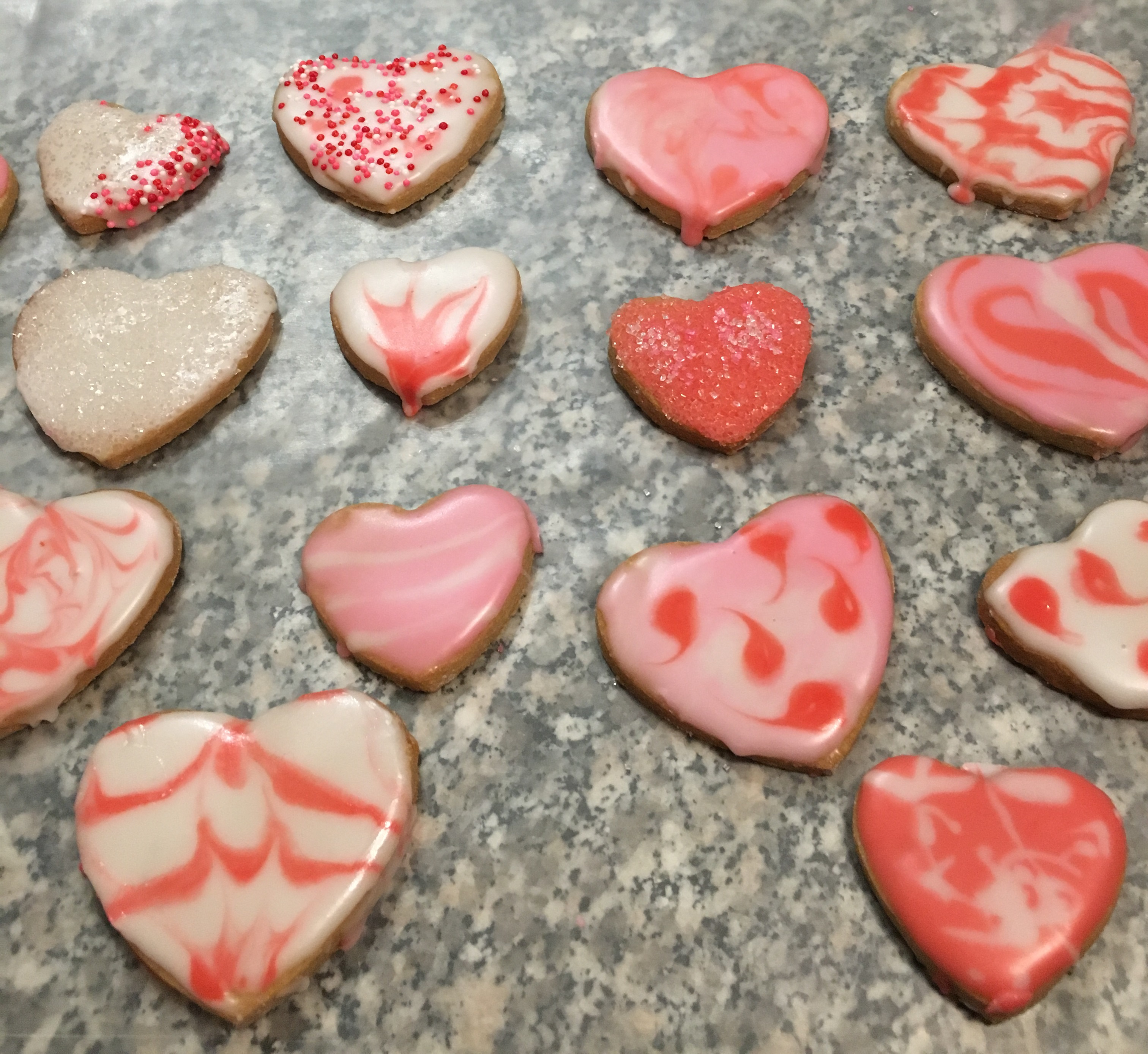 Valentine's cookies 2017/365/44